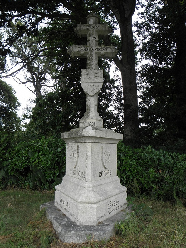 Croix des trois évêchés en Romillé (35).